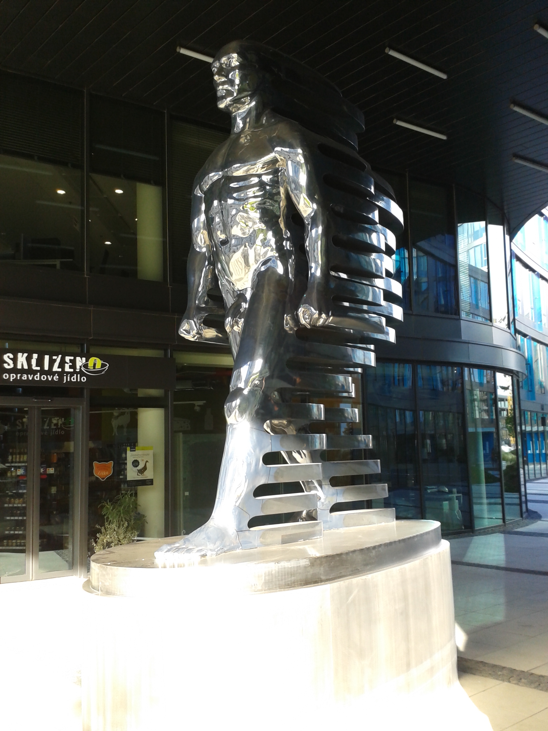 Plastika "Speederman" je vysoká 4 metry a má hmotnost 600 kg. Představuje nahou stříbrnou postavu superhrdiny viditelně zamrzlého v nelidsky rychlém pohybu, který je znázorněn opouštěním pohybových linií "táhnoucích se" za lidskou figurou. Mužská postava znázorňuje metaforu pro lidskou evoluci a estetické ideály lidského těla. Zároveň je i silným komentářem zrychleného tempa života ve městských společnostech v době nových technologií. Současně akcentuje složitost na cestě v našem každodenním životě. Speedermana nelze zaměňovat za Marvelovo "Silver Surfera" ani za tekutého kovového "Terminátora" (z filmu "Terminátor II"). Ani to není žádná komiksová postava. Plastika byla veřejnosti poprvé představena na 3. ročníku světového festival v Amsterodamu v roce 2013. Speederman je instalován ve veřejném prostoru v areálu brownfieldu Waltrovky v Praze Jinonicích.